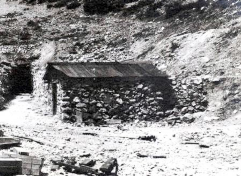 El Teniente, vivienda primitiva, con muros de material en sitio, y cubierta de fierro galvanizado